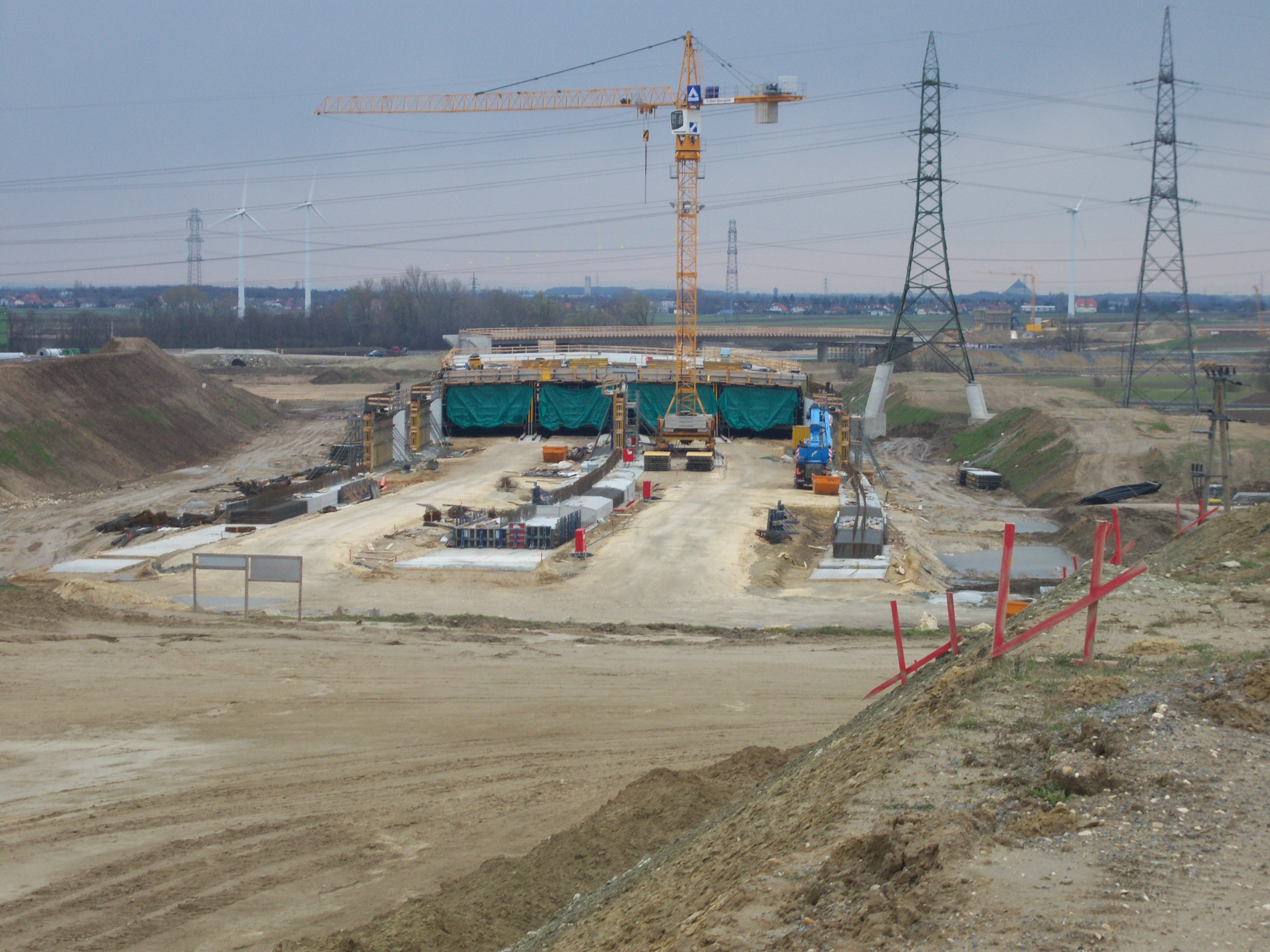 A5 Nord Autobahn - Tunnel Eibesbrunn